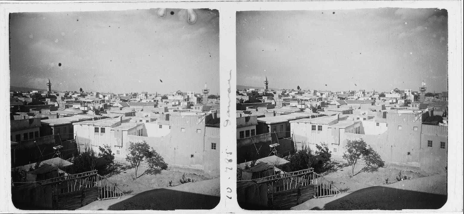 Nova vista de Damasc des d ' un terrat. Josep Salvany i Blanch (1924)